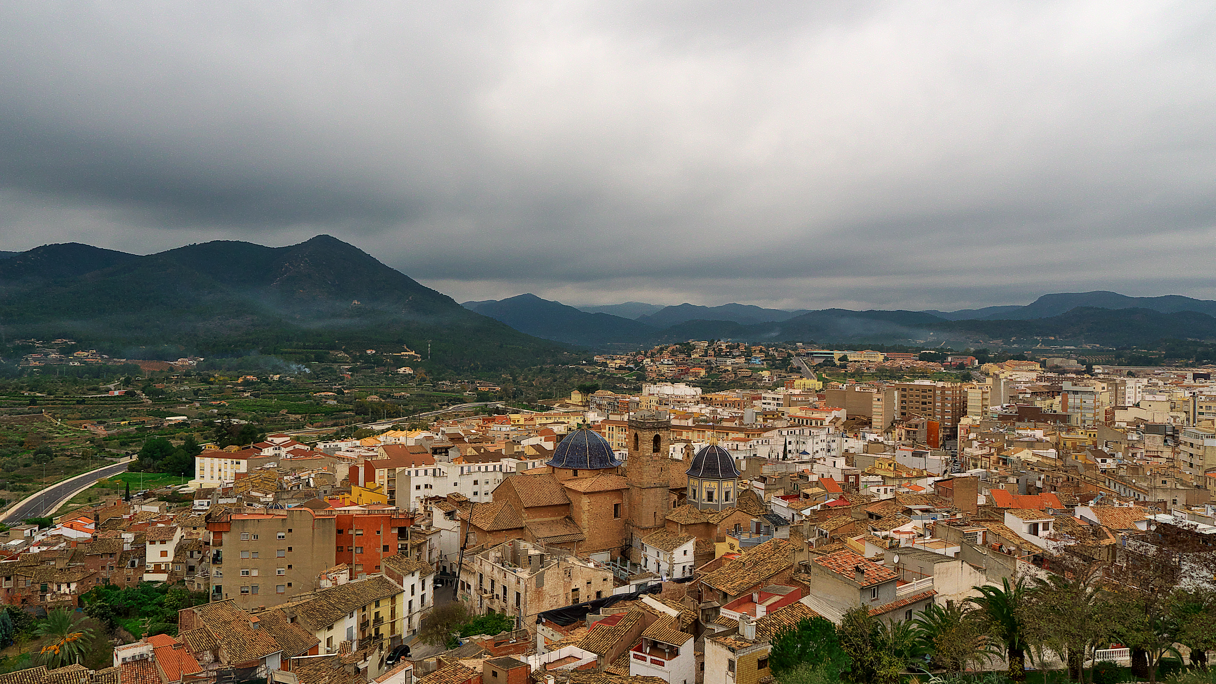 Vista de la población